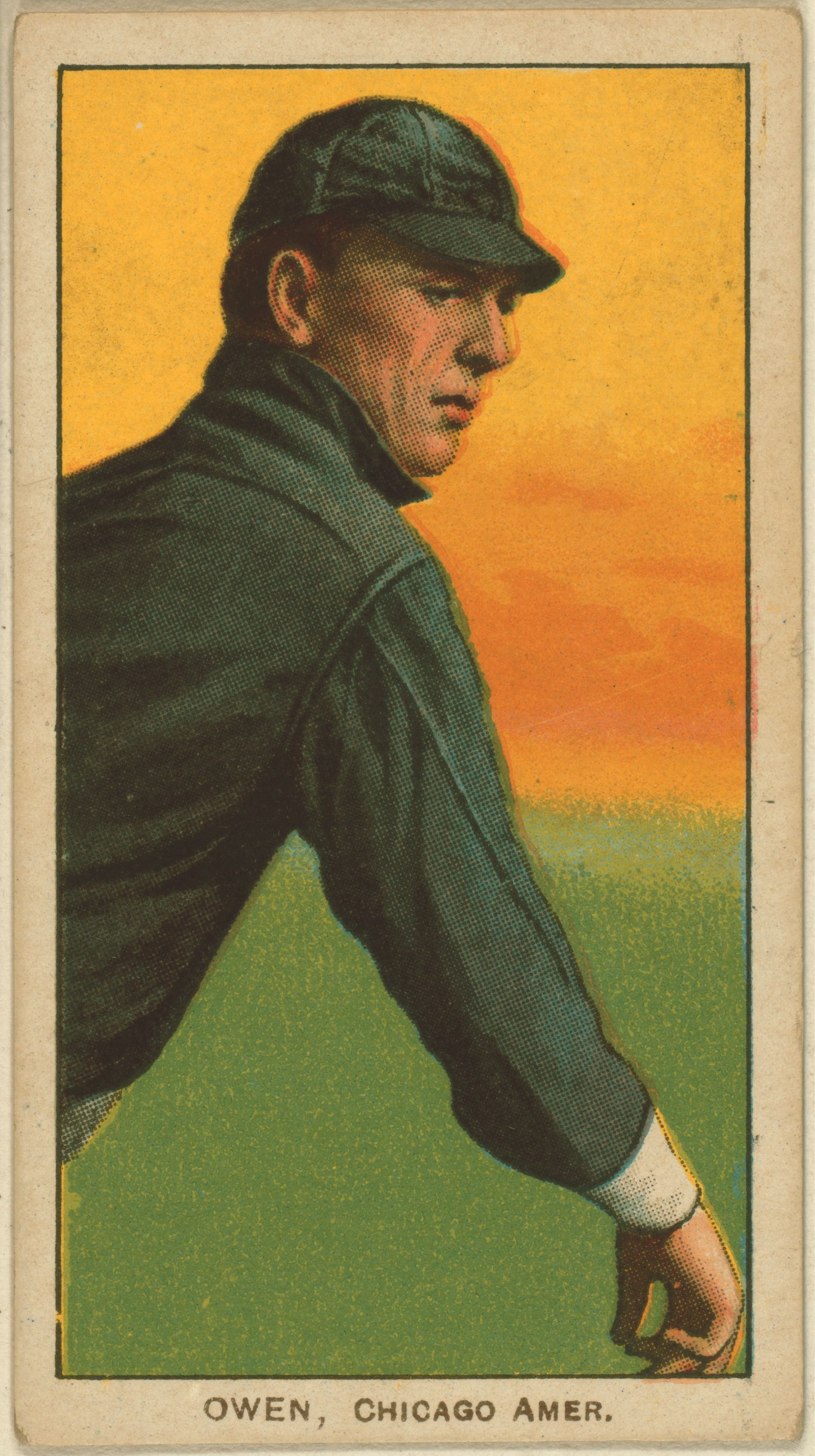 Frank Owen